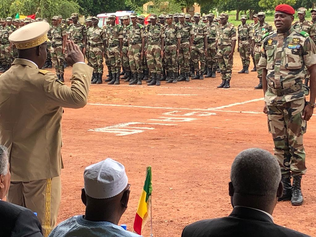 Général Ibrahim Dahirou Dembélé, ministre de la Défense et Général Keba Sangaré chef d'état major armée de terre, au Mali, le 8 septembre 2019. (VOA/Kassim Traoré)